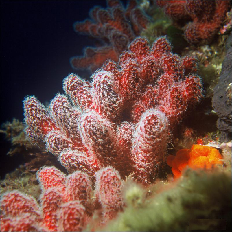 alcyonium palmatum (versie 2)